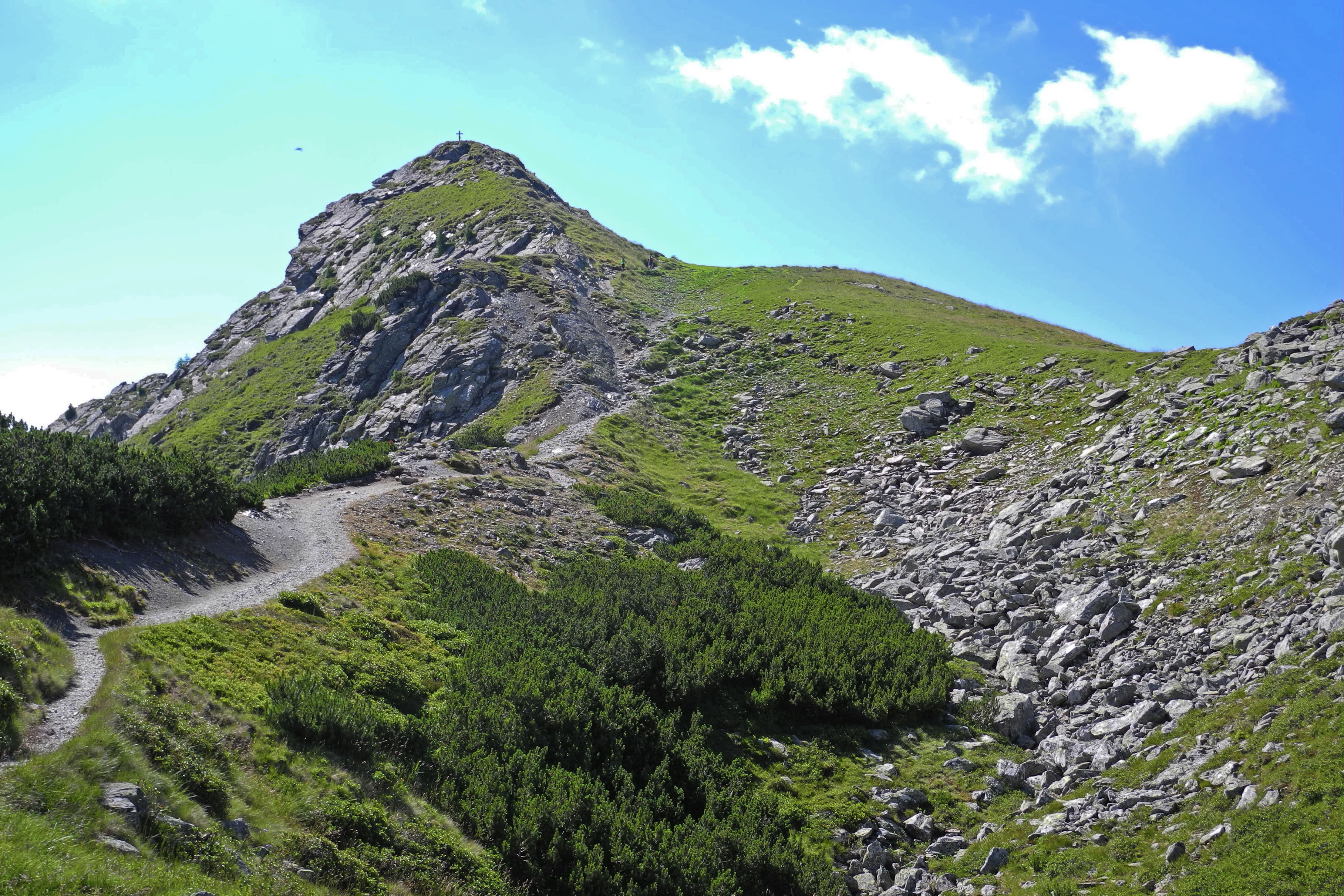 Rippetegg (2126 m) oberhalb der Reiteralm